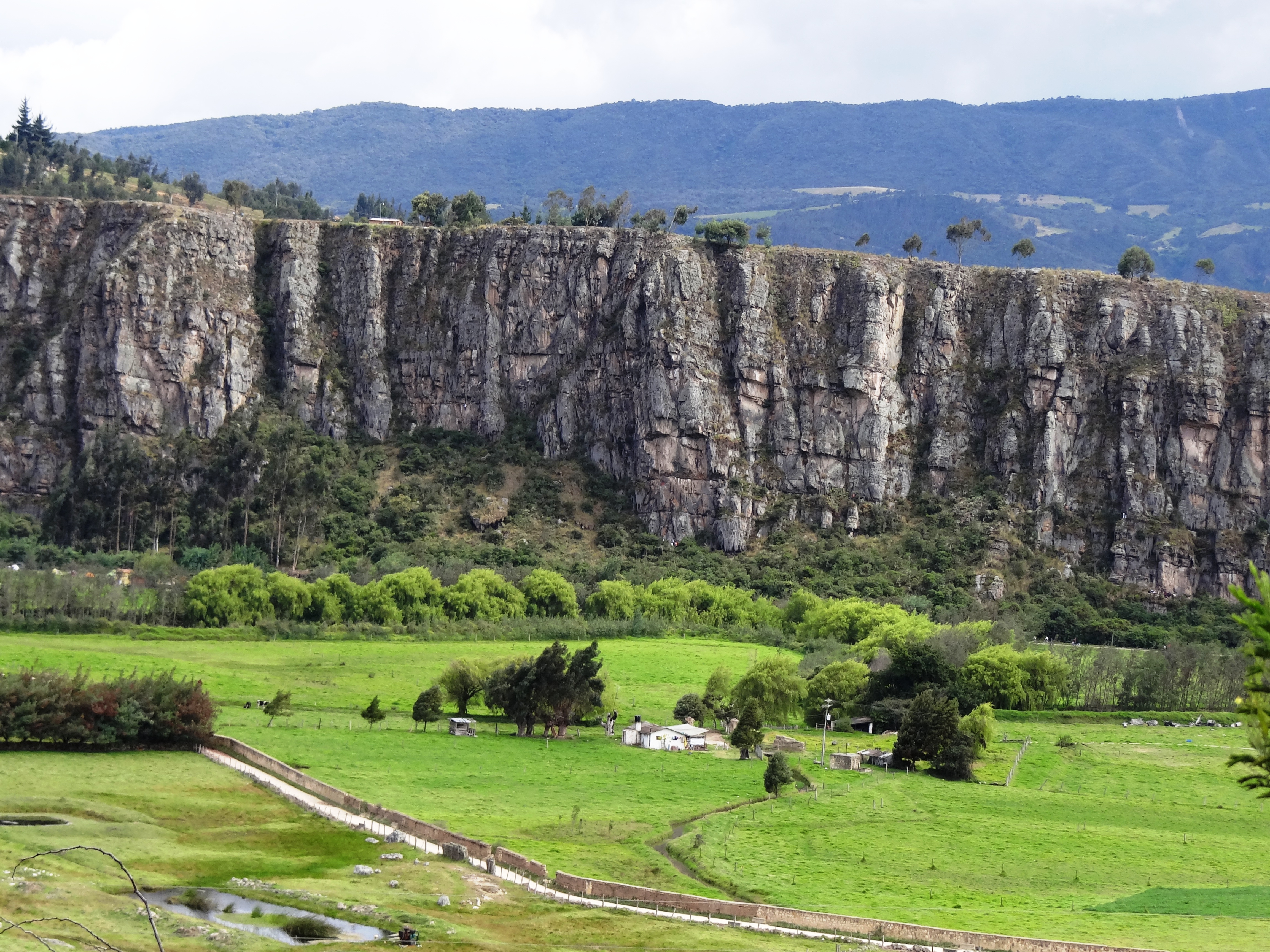 Rocas de Suesca en el municipio de Suesca, departamento de Cundinamarca, Colombia